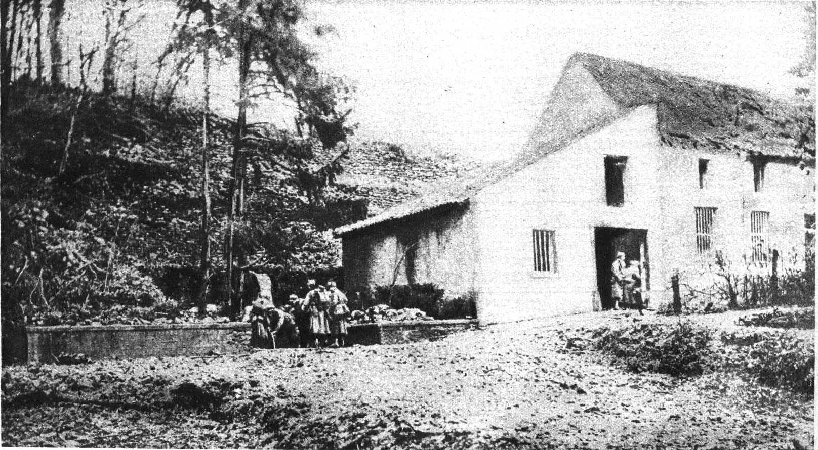 la fontaine et la maison du père Horion, vue du 9 décembre 1914, elle se trouvait entre les lignes françaises et allemandes, chacun venait y puiser de l'eau à tour de rôle.